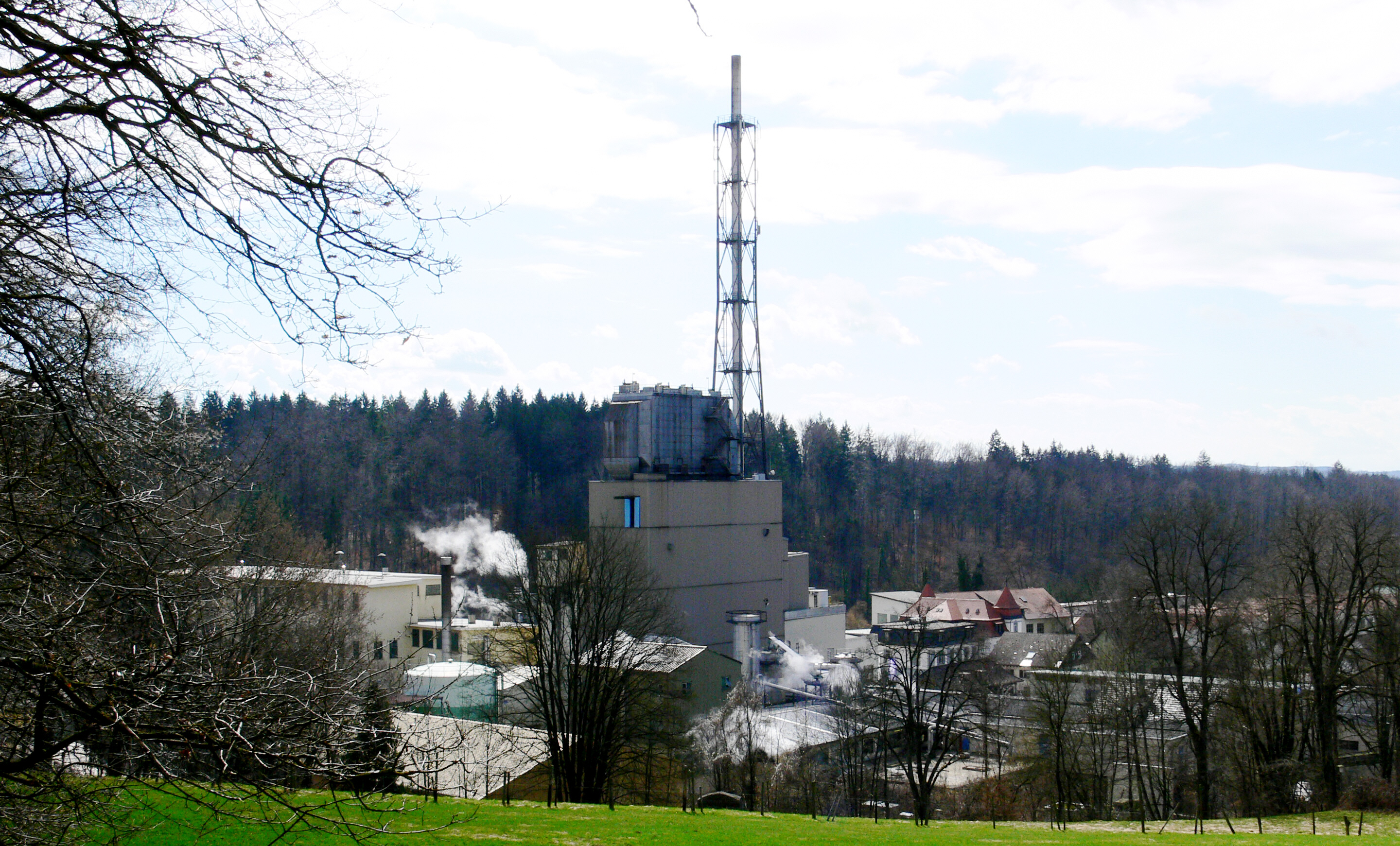 Wolpertswende, Ortsteil Mochenwangen: Papierfabrik